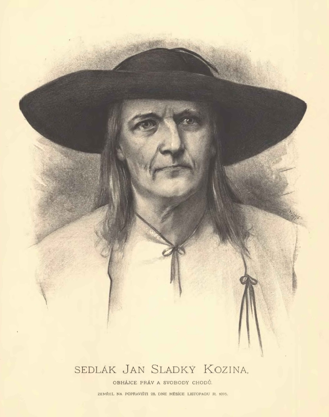 Portréty českých osobností od Jana Vilímka